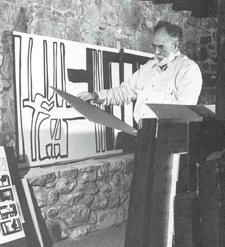 Néstor Basterretxea euskal eskultorea eta zinemagilea